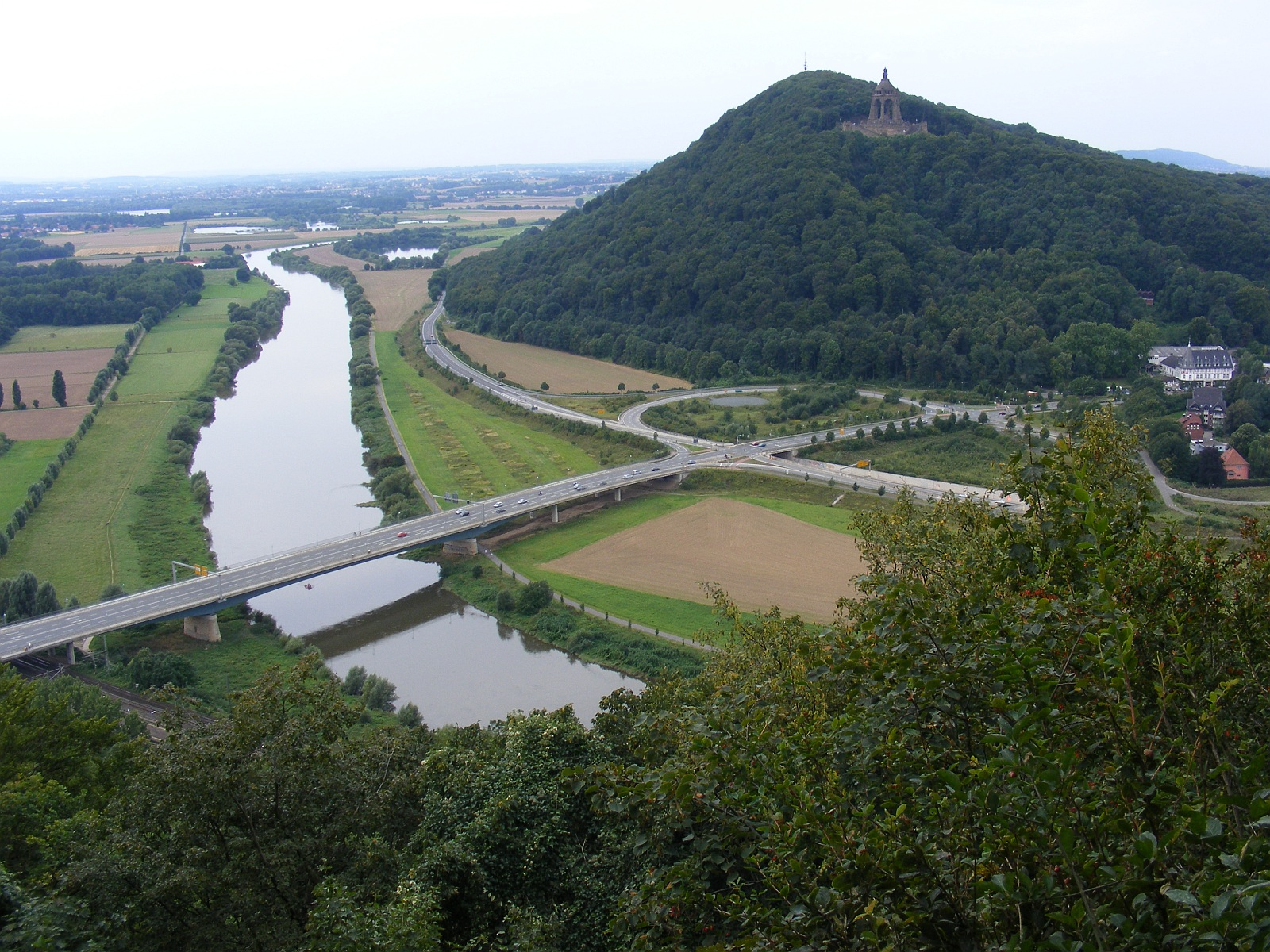 Porta Westfalica: Blick von der Porta-Kanzel hinüber zum Kaiser-Wilhelm-Denkmal und die neue Weserbrücke.